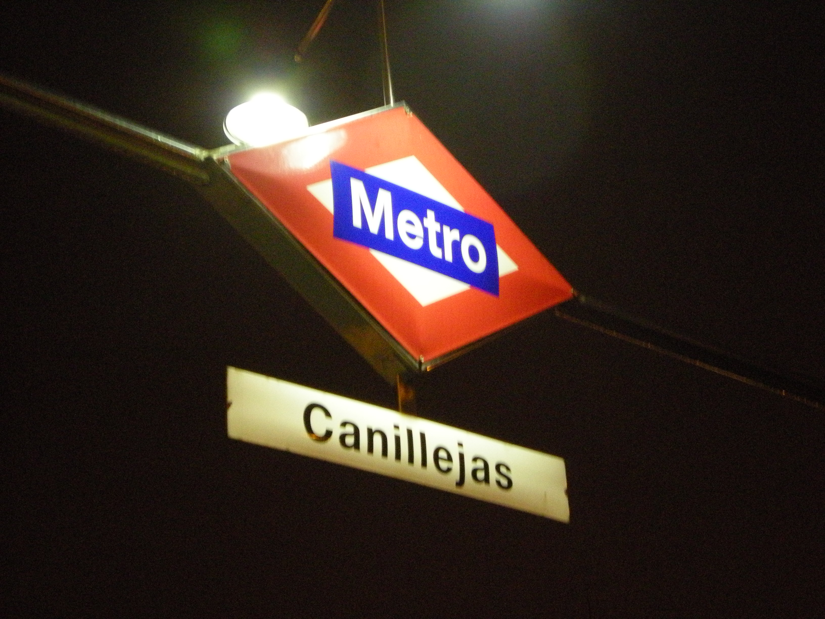 Metro "Canillejas" Madrid Comunidad de Madrid España - Spain